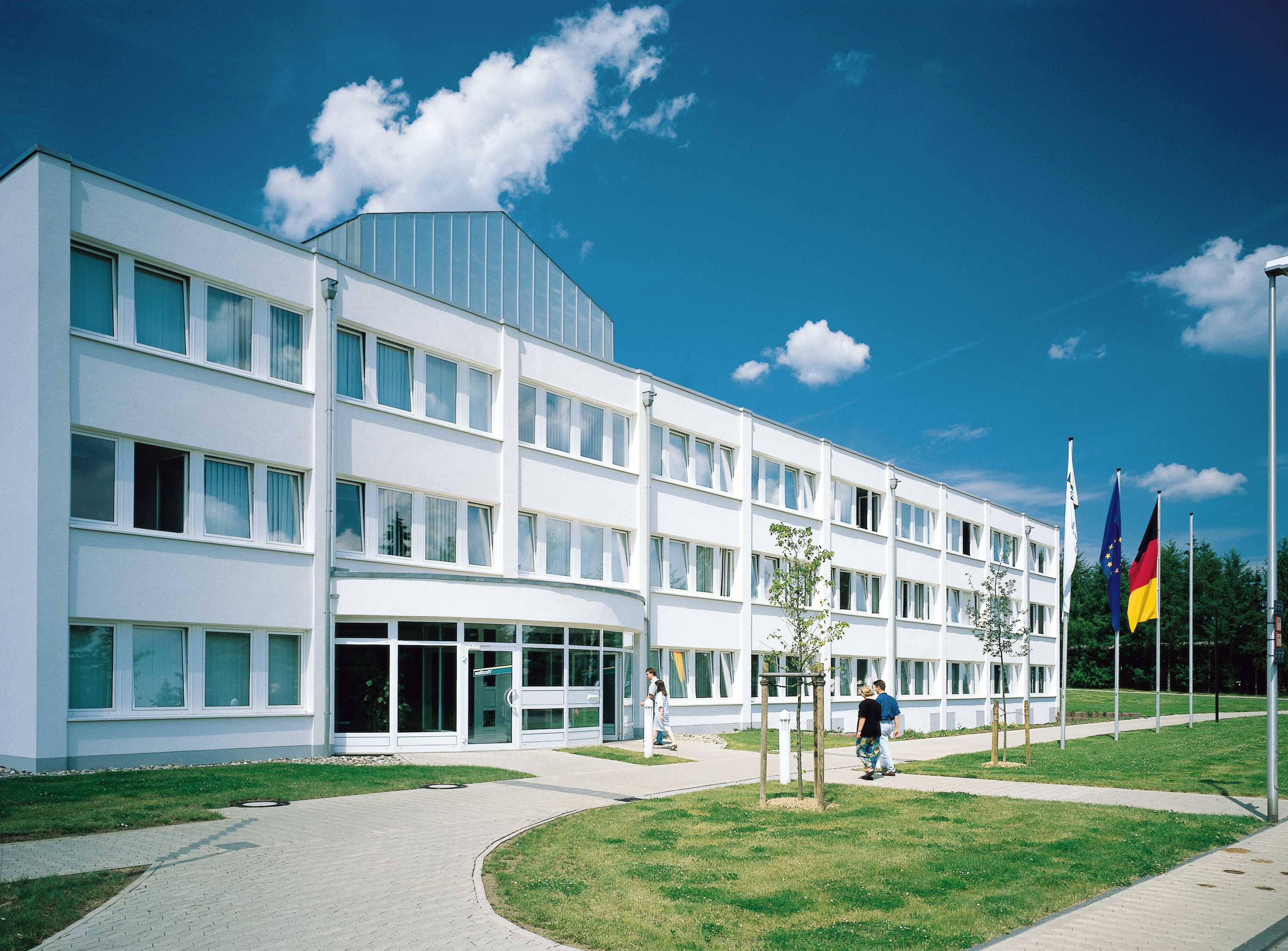 Verwaltung wolfcraft